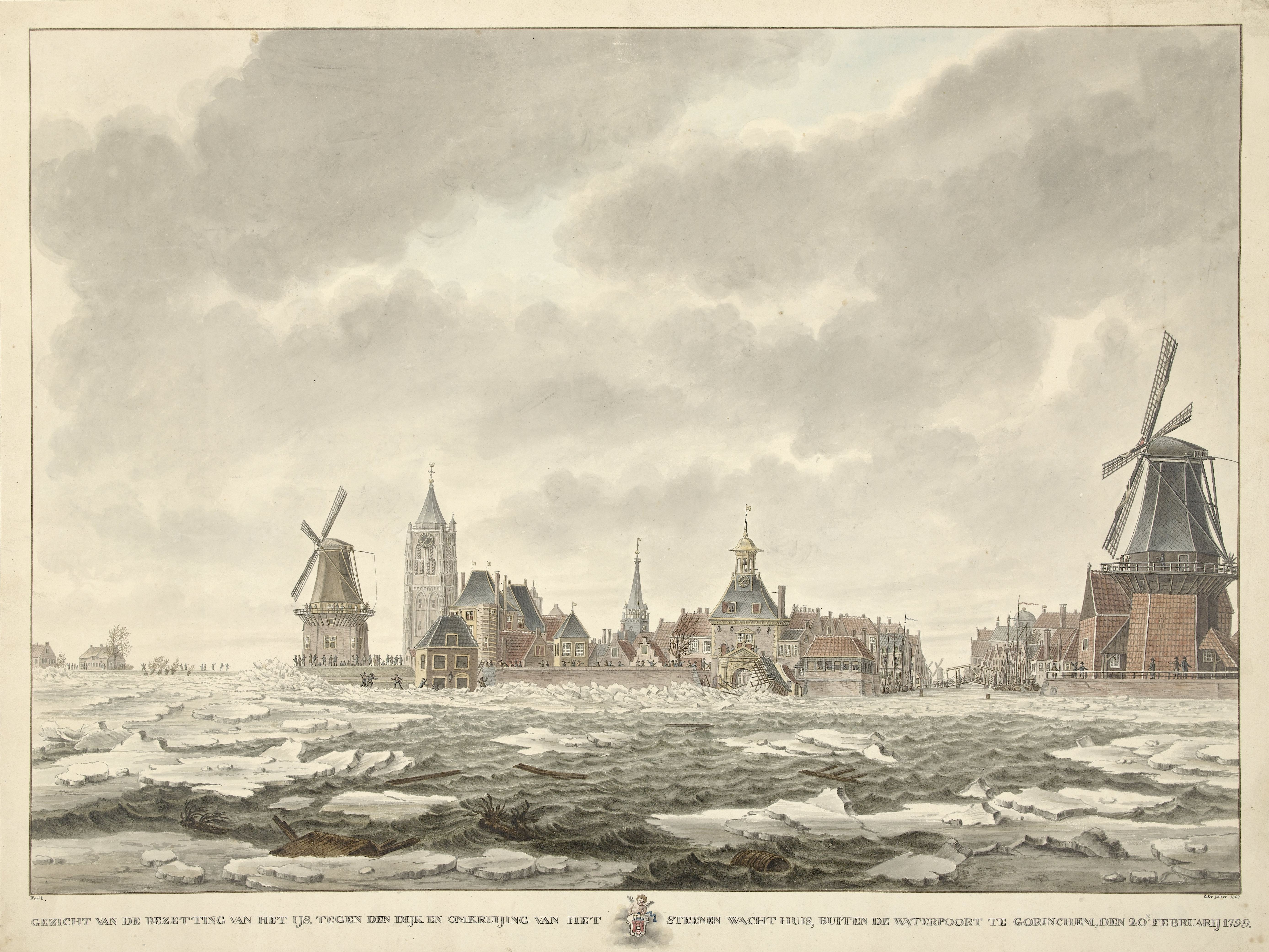 Gezicht van de bezetting van het ijs, tegen den dijk en omkruijing van het steenen wachthuis, buiten de Waterpoort te Gorinchem, den 20.n Februarij 1799. Ontwerp voor een prent.